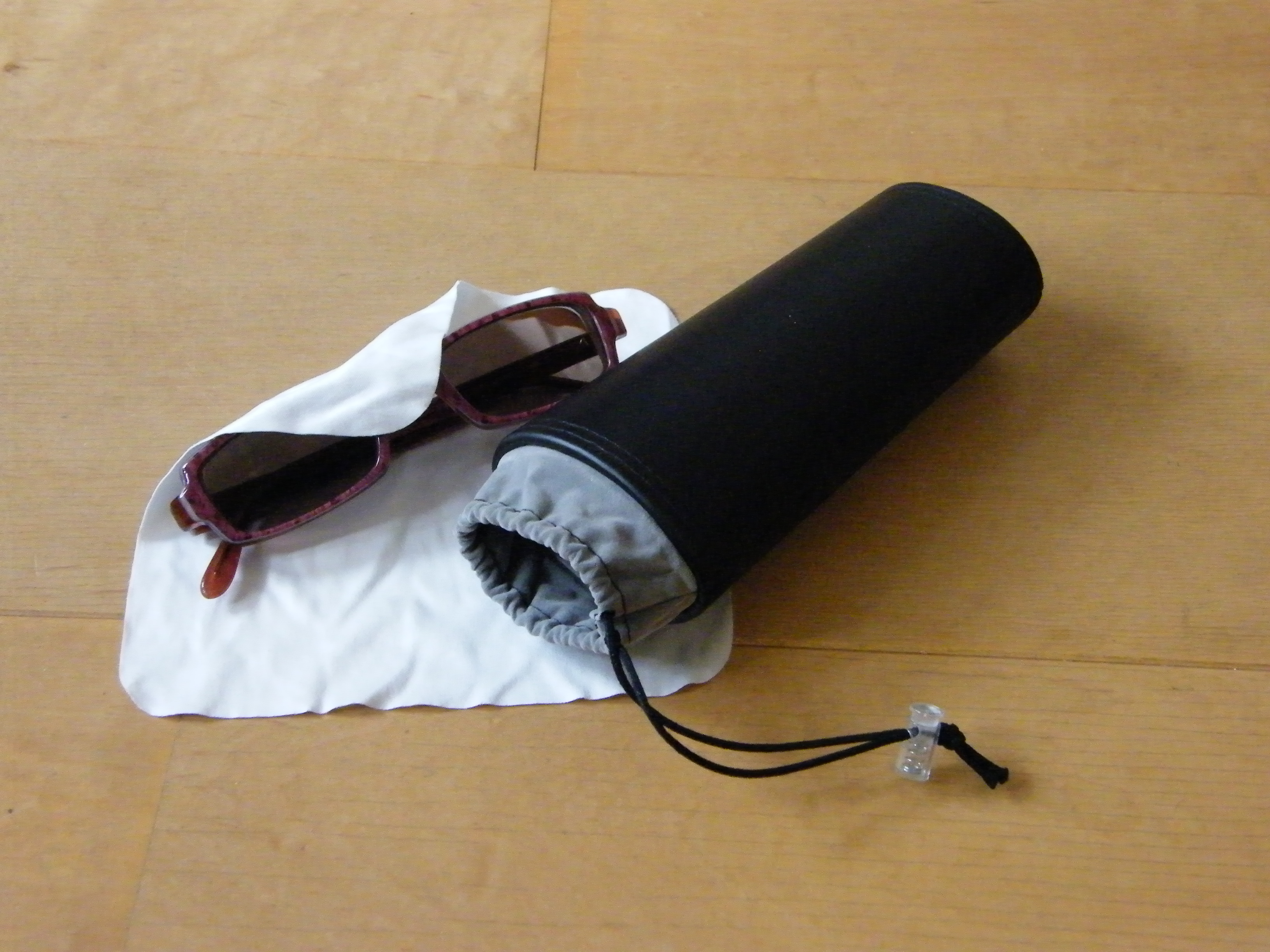 Brillekoker met zonnebril en poetsdoekje